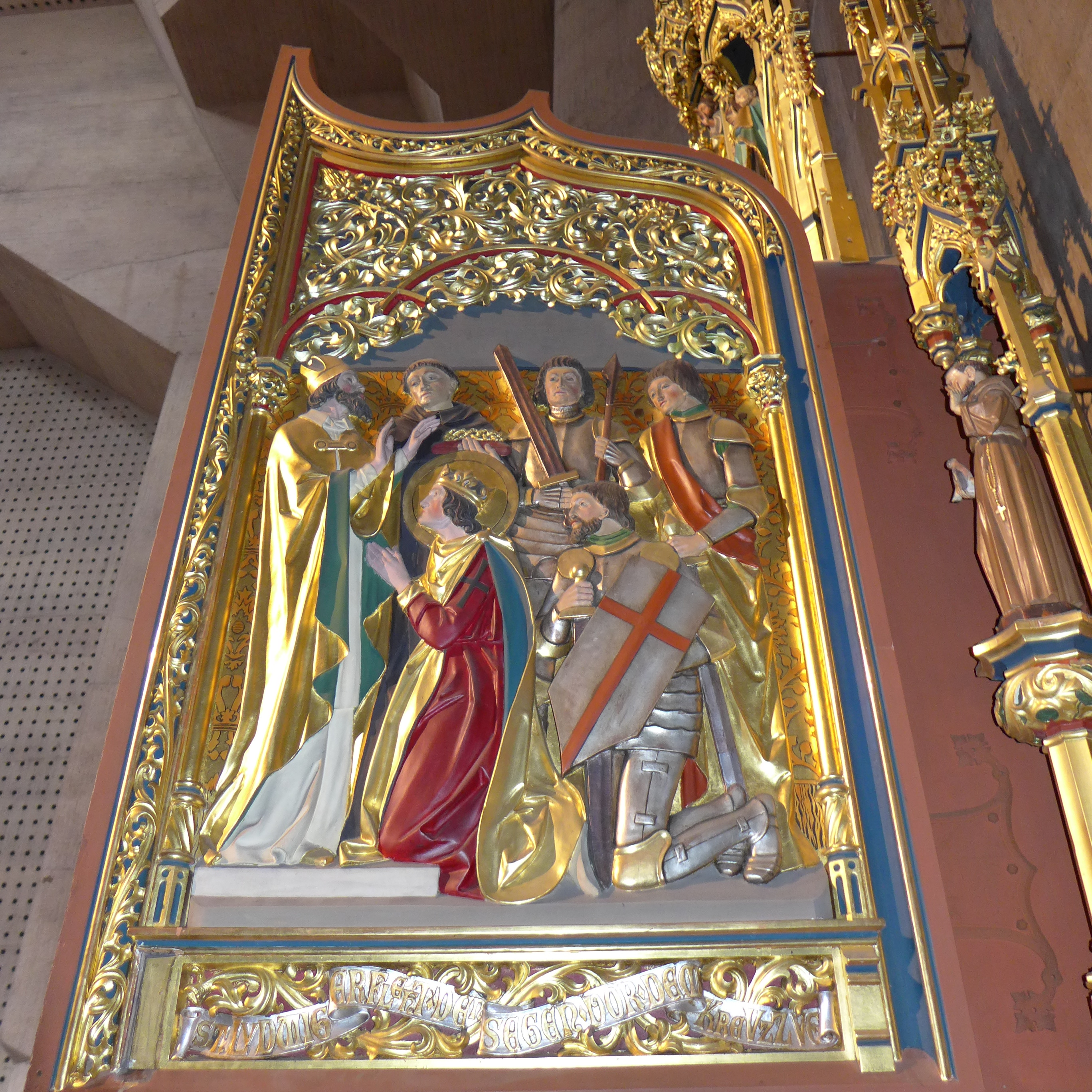 St. Ludwig (Saarlouis), Neogotischer Flügelaltar, Flügelrelief "St. Ludwig erfleht den Segen vor dem Kreuzzug"